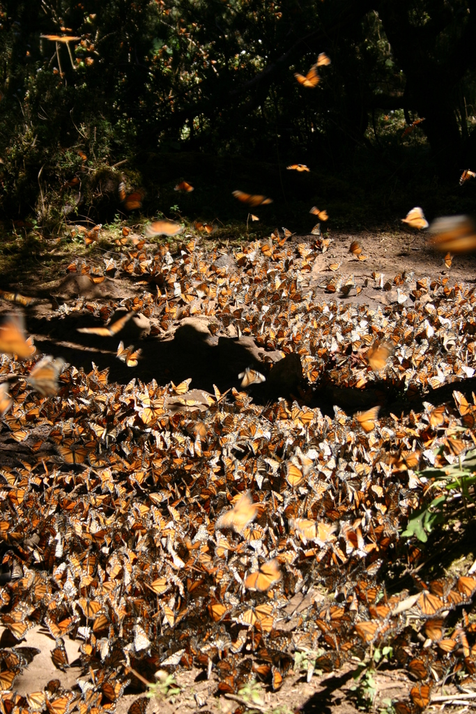 Michoacán Mexico